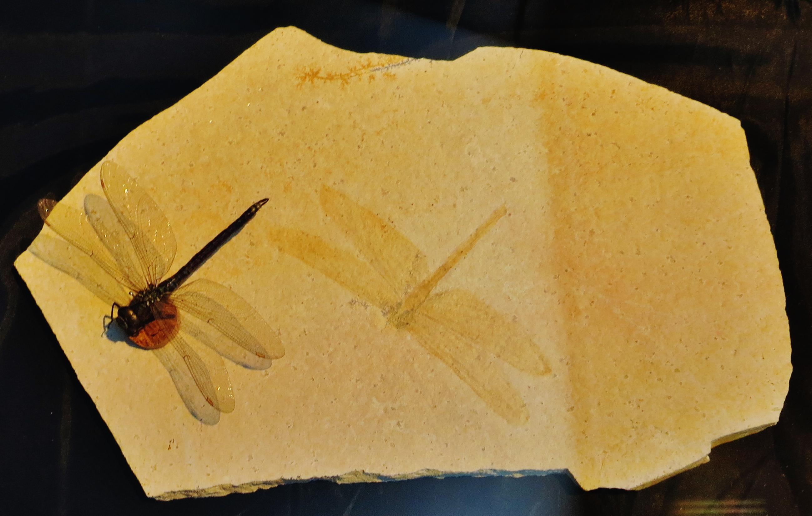 Took the picture at Natural History Museum, Nurnberg